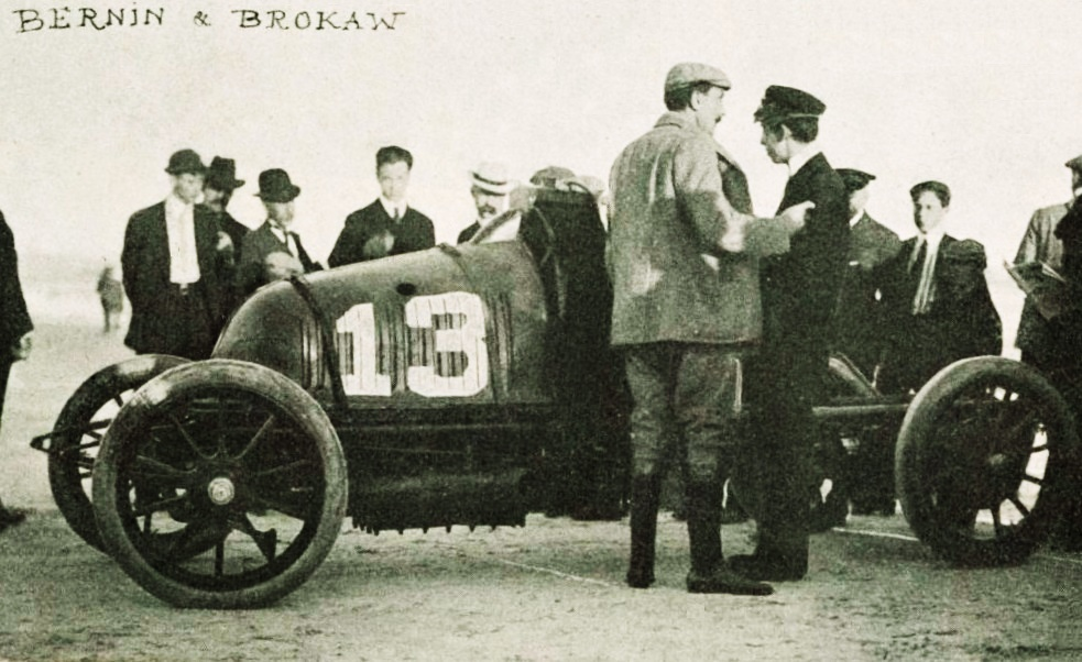 Maurice Bernin (à g.) et Gould Brokaw en discussion au 'Florida Speed Carnival' de janvier 1905 - La Vie au Grand Air du 9 février 1905, p.111